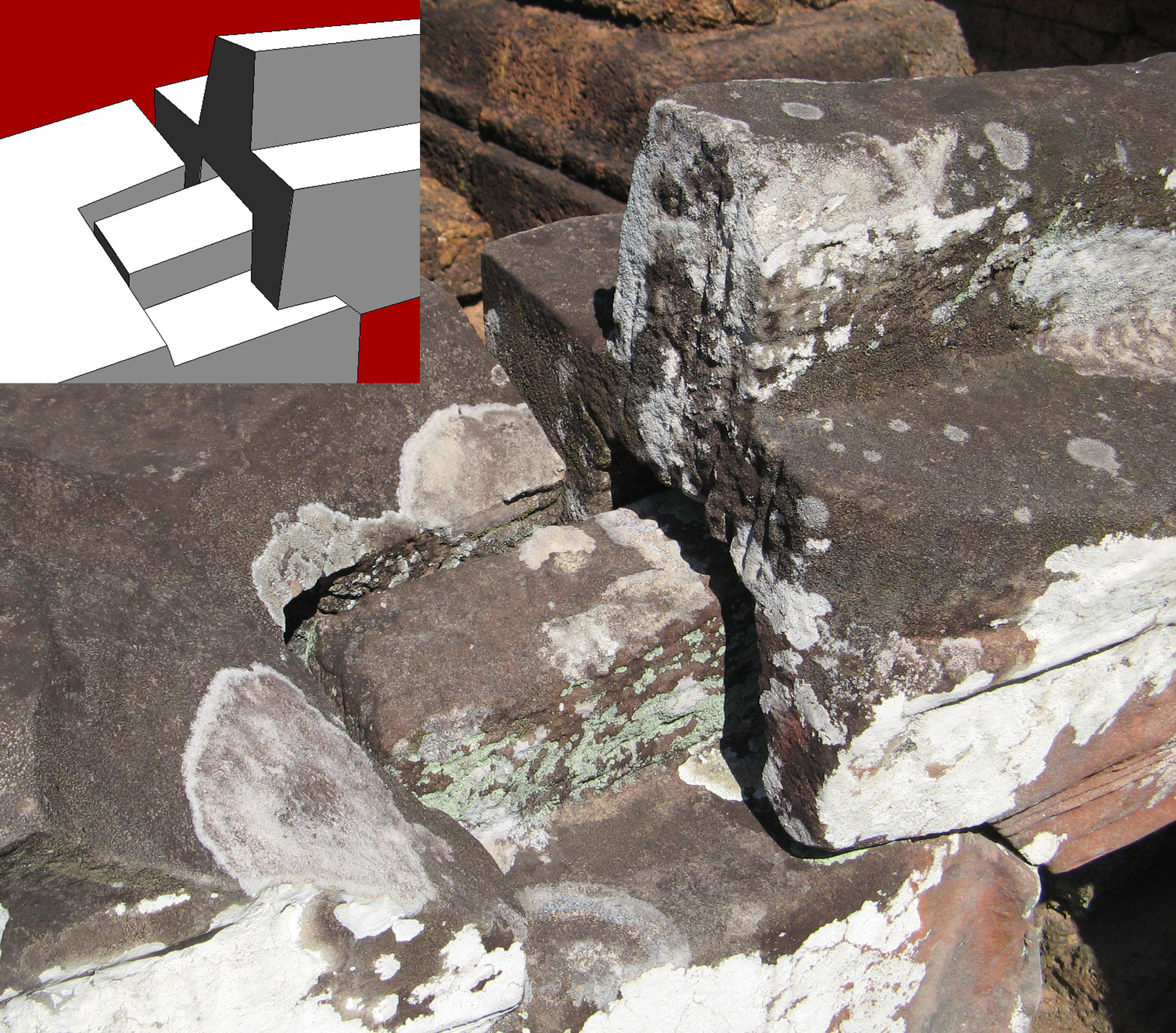 Cajeado labrado en piedra en el templo de Phimeanakas, en Angkor, Camboya